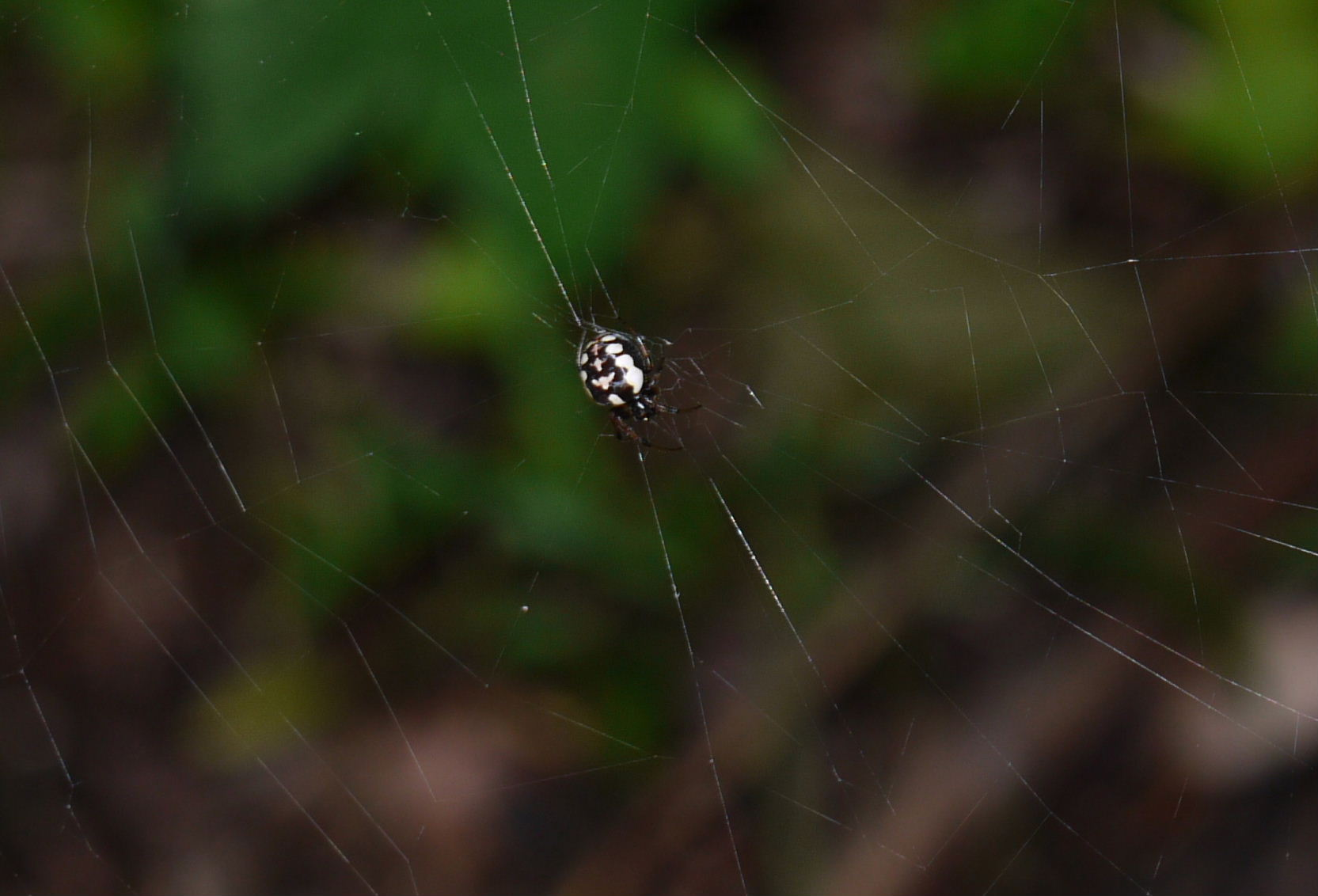 Araneus ejusmodi ヌサオニグモ（コガネグモ科） ２０１３年８月４日：和歌山県田辺市山間部にて